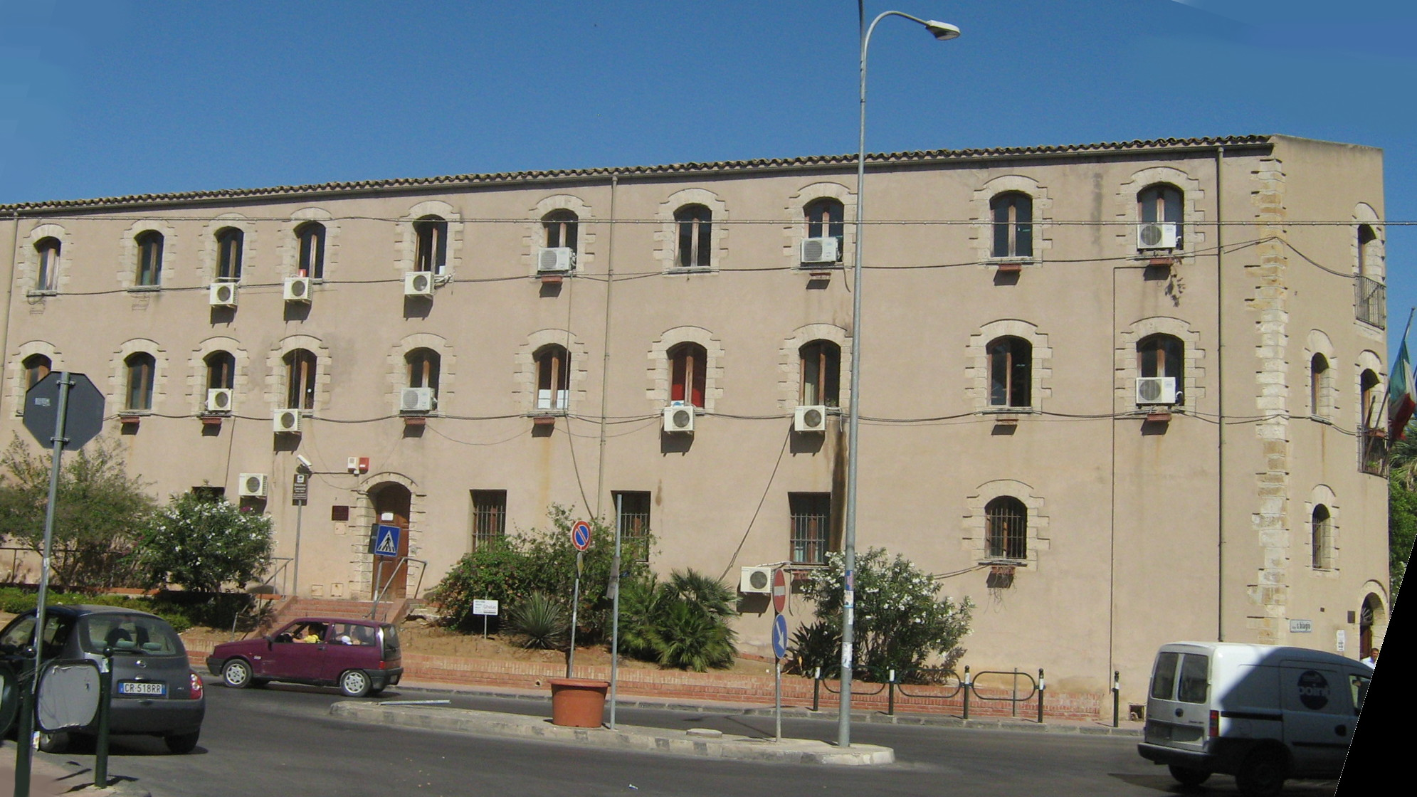 Biblioteca comunale di Gela, già convento Agostiniano (XIX secolo) Categoria:Gela